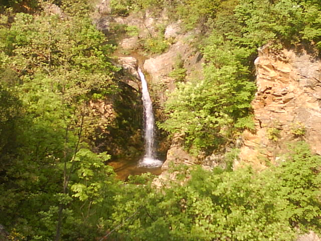 Waterfall over village Prsten